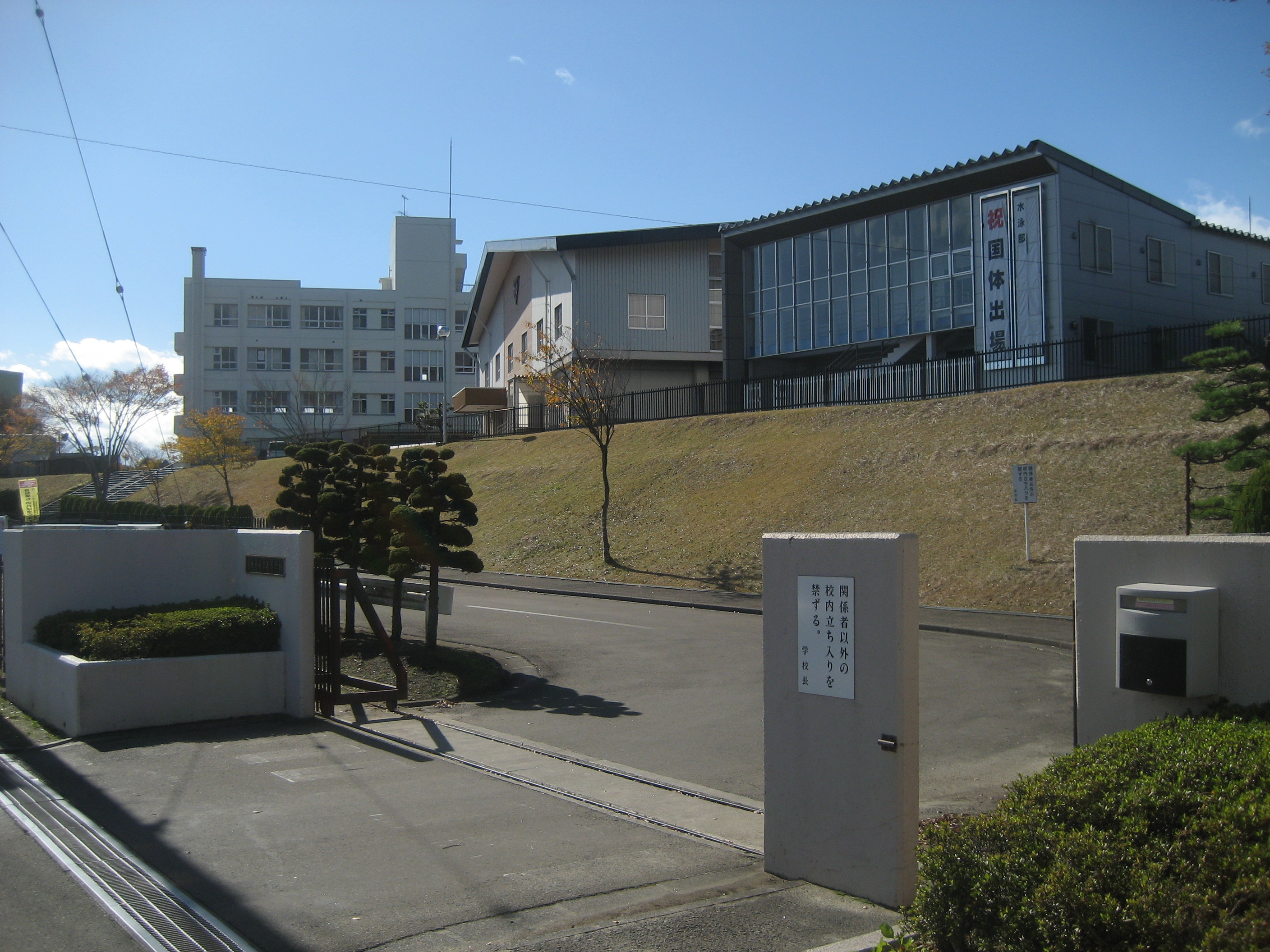 宮城県利府高等学校（正門付近を撮影）